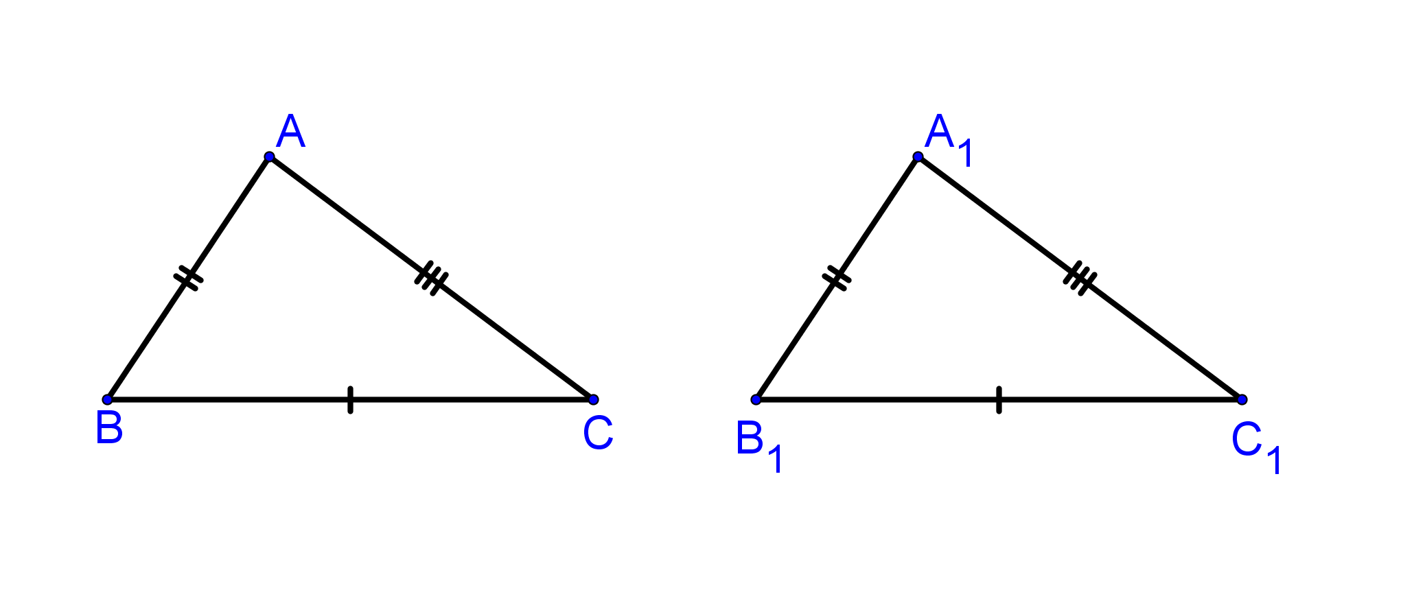 файл создан в среде GeoGebra